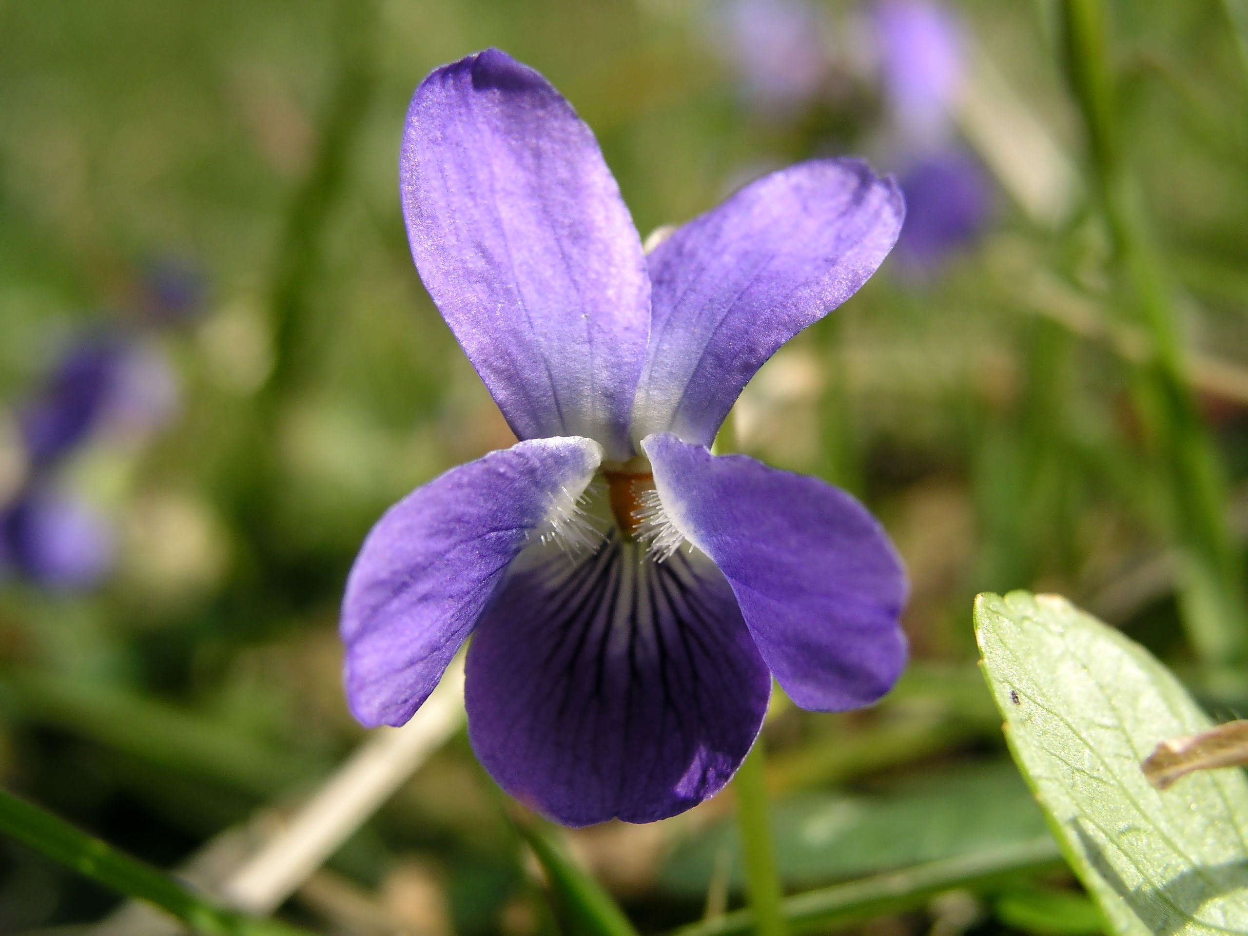 Violet